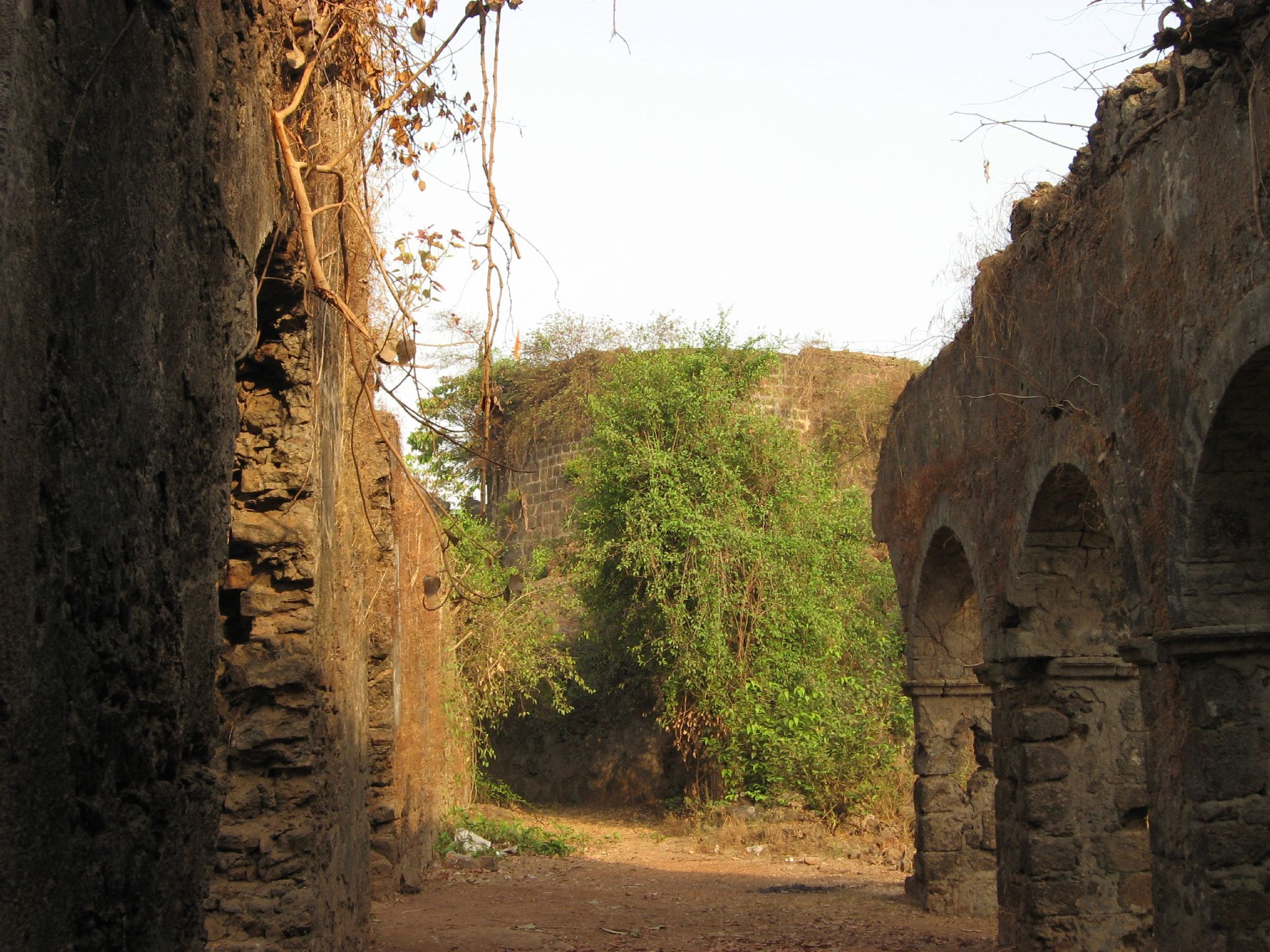 Godhbunder fort, Mumbai